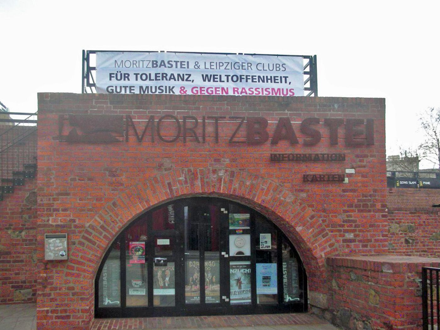 Moritzbastei in Leipzig, Informationszentrum